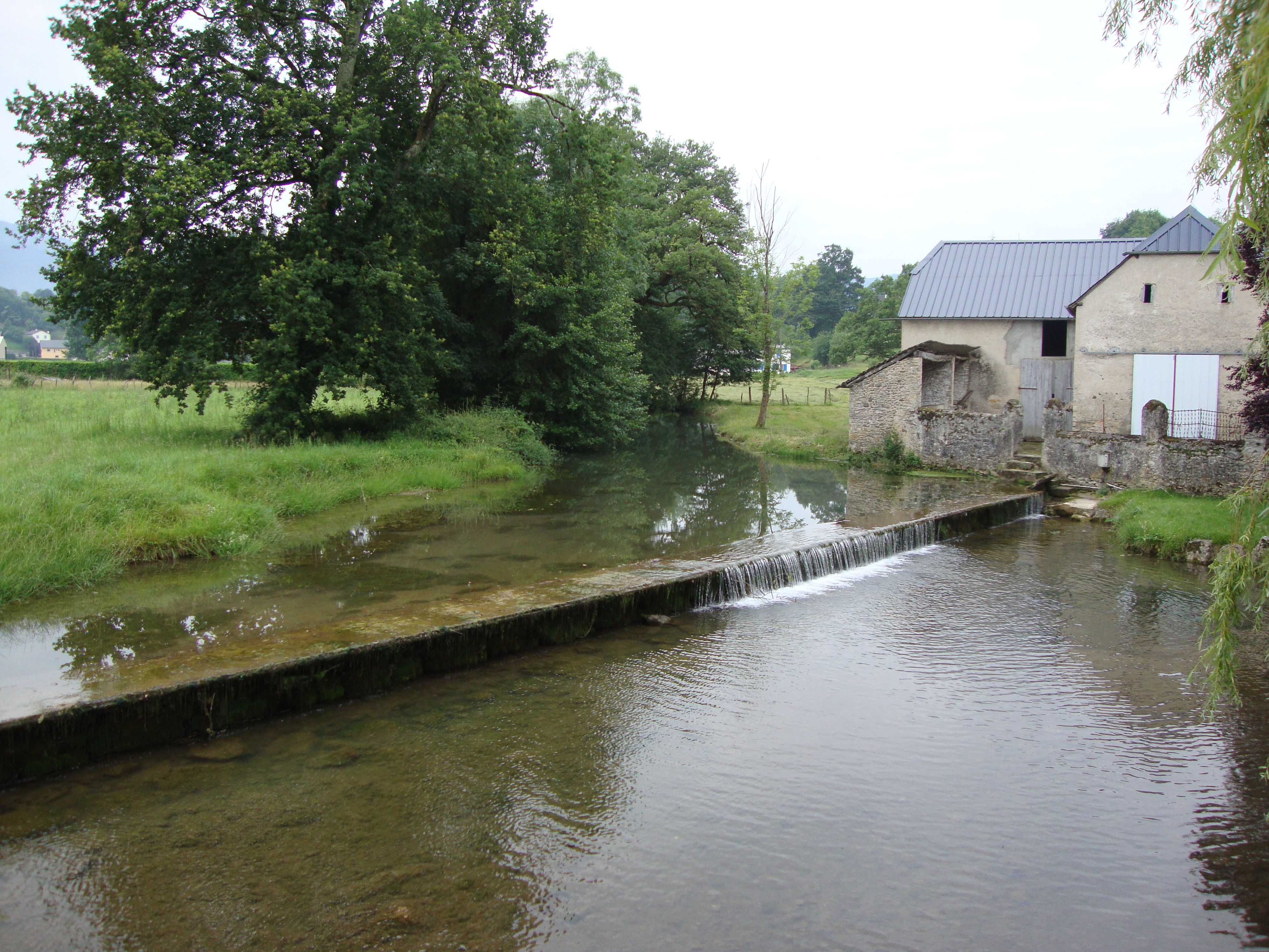 Agnos (Pyr-Atl, Fr) Mielle (river).